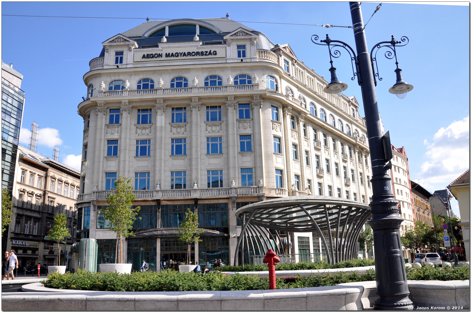 1091, Budapest, Üllői út 1.: AEGON-székház (műemlék)